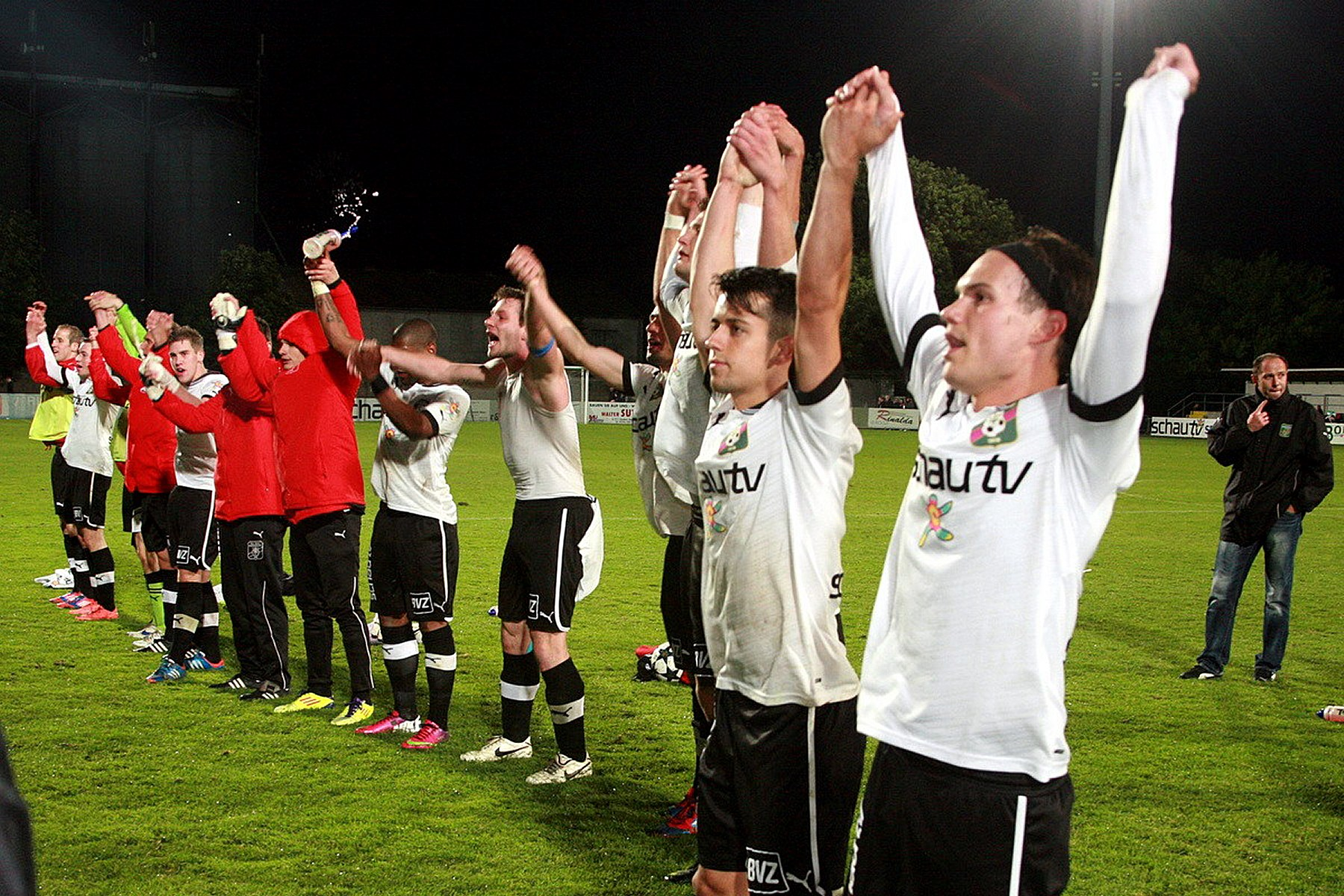 Österreichische Fußballmeisterschaft 2012/13 – Relegationsspiel am 3. Juni 2013 SC-ESV Parndorf vs. FC Blau-Weiß Linz 2:1 (1:0) – Das Bild zeigt den Siegesjubel der Spieler des SC-ESV Parndorf.